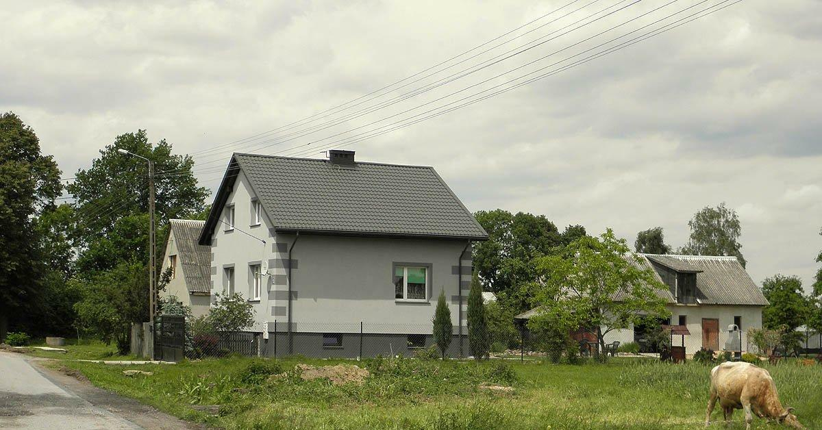 Jeden z nowszych budynków we wsi.